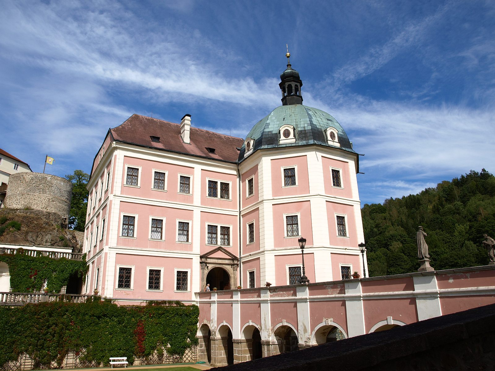 Hrad a zámek Bečov nad Teplou, Bečov nad Teplou 9